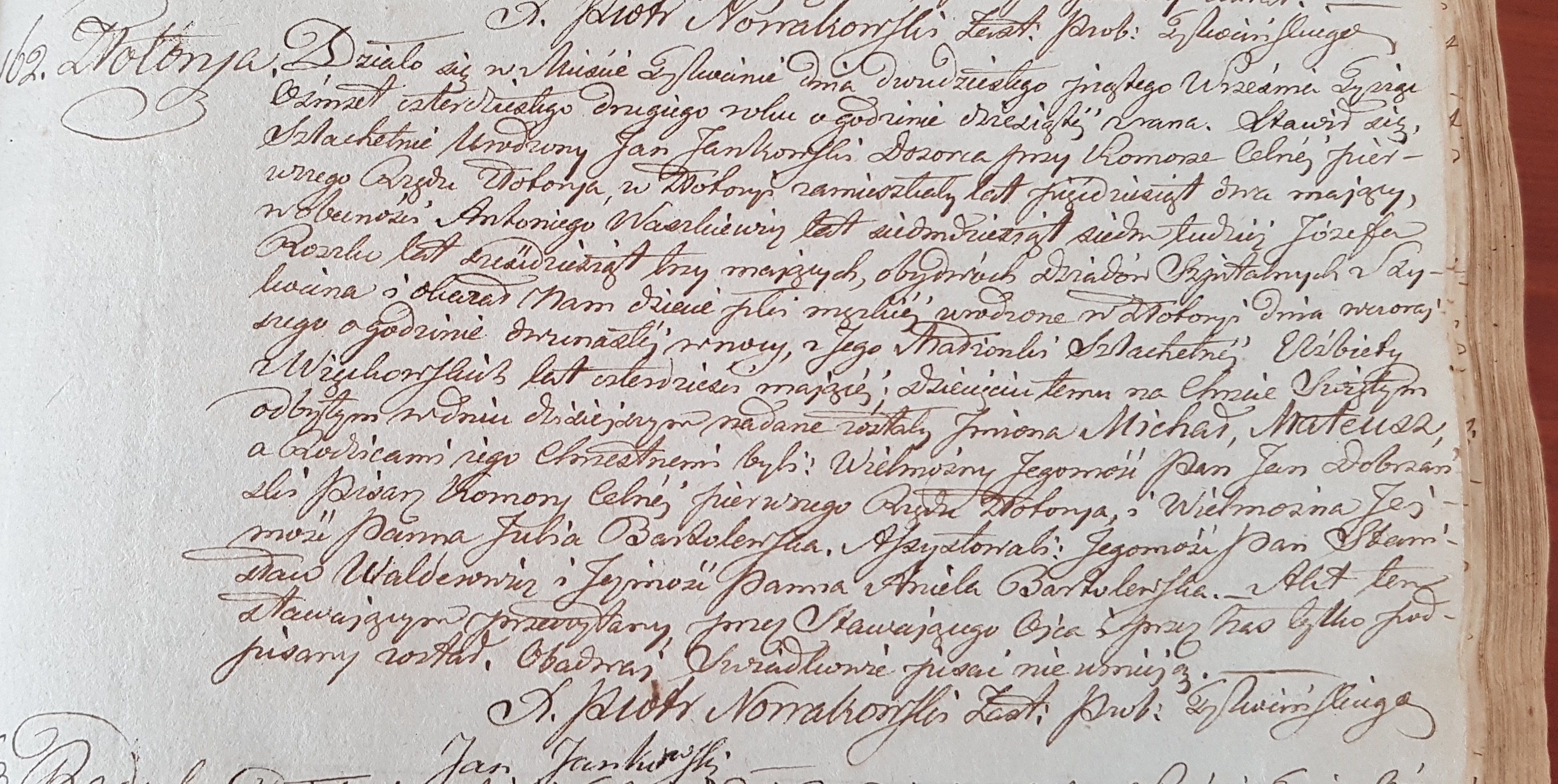 Działo się to w Mieście Tykocinie dnia dwudziestego piątego Września tysiąc osiemset czterdziestego drugiego roku o godzinie dziewiątej zrana. Stawił się szlachetnie urodzony Jan Jankowski, dozorca przy komorze celnej Pierwszego Urzędu Złotorya, w Złotoryi zamieszkały lat pięćdziesiąt dwa mający, w obecności Antoniego Waszkiewicz lat siedemdziesiąt siedem tudzież Józefa Roszko lat sześćdziesiąt trzy mających, obydwóch dziadów szpitalnych z Tykocina i okazał nam dziecię płci męskiej urodzone w Złotoryi dnia wczorajszego o godzinie dwunastej wnocy z jego Małżonki Szlachetnej Elżbiety z Więckowskich lat czterdzieści mającej; dziecięciu temu na Chrzcie Świętym, odbytym w dniu dzisiejszym nadane zostały imiona Michał, Mateusz, a Rodzicami niego Chrzestnemi byli: Wielmożny Jegomość Pan Jan Dobrzański, Pisarz Komory Celnej Pierwszego Urzędu Złotorya i Wielmożna Jejmość Panna Julia Bardolewska. Asystowali: Jegomości Pan Stanisław Walderowicz i Jejmości Panna Aniela Bardolewska. Akt ten stawającym przeczytany przez Stawającego Ojca i przez Niego tylko pisany podpisany został. Obydwaj dziadkowie pisać nie umieją. X Piotr Nowakowski, prob. Tykocińskiego